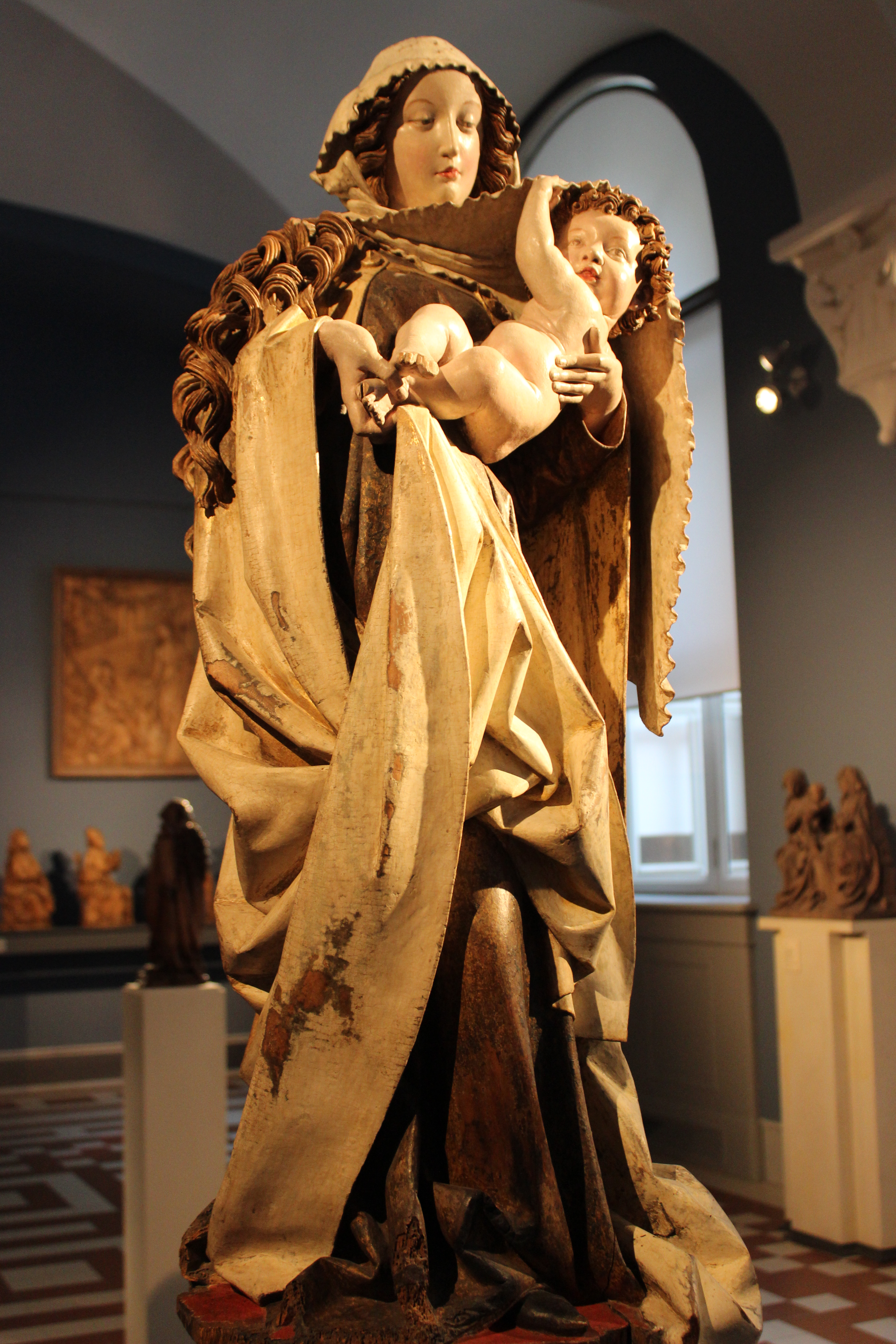 Virgen de Dangolsheim, Niklaus Gerhaert van Leyden. Berlín, Bode Museum.